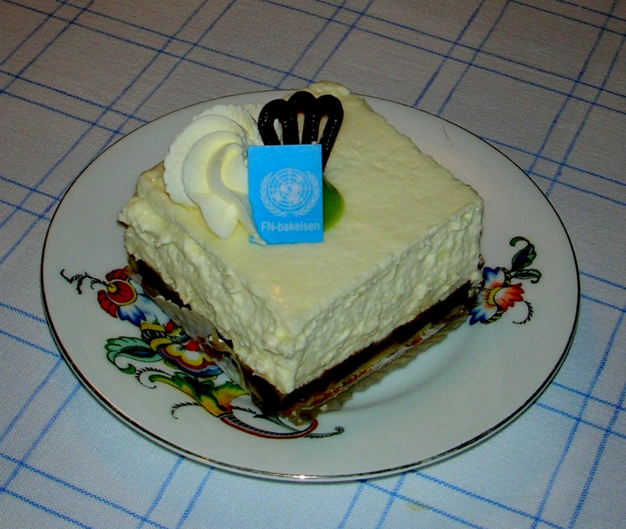 En FN-bakelse.